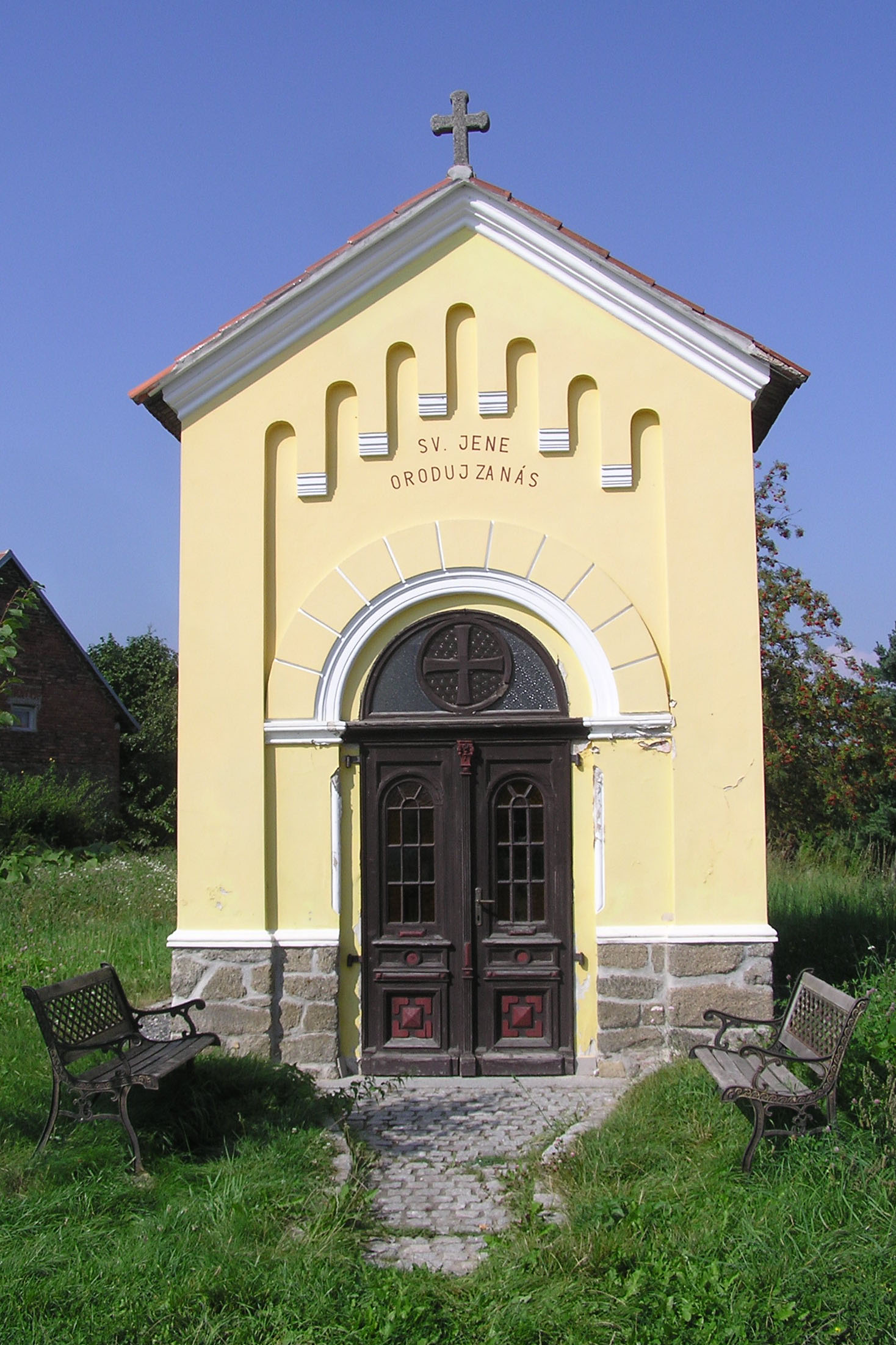 Bystřice-Radošovice, okres Benešov. Kaplička nad obcí